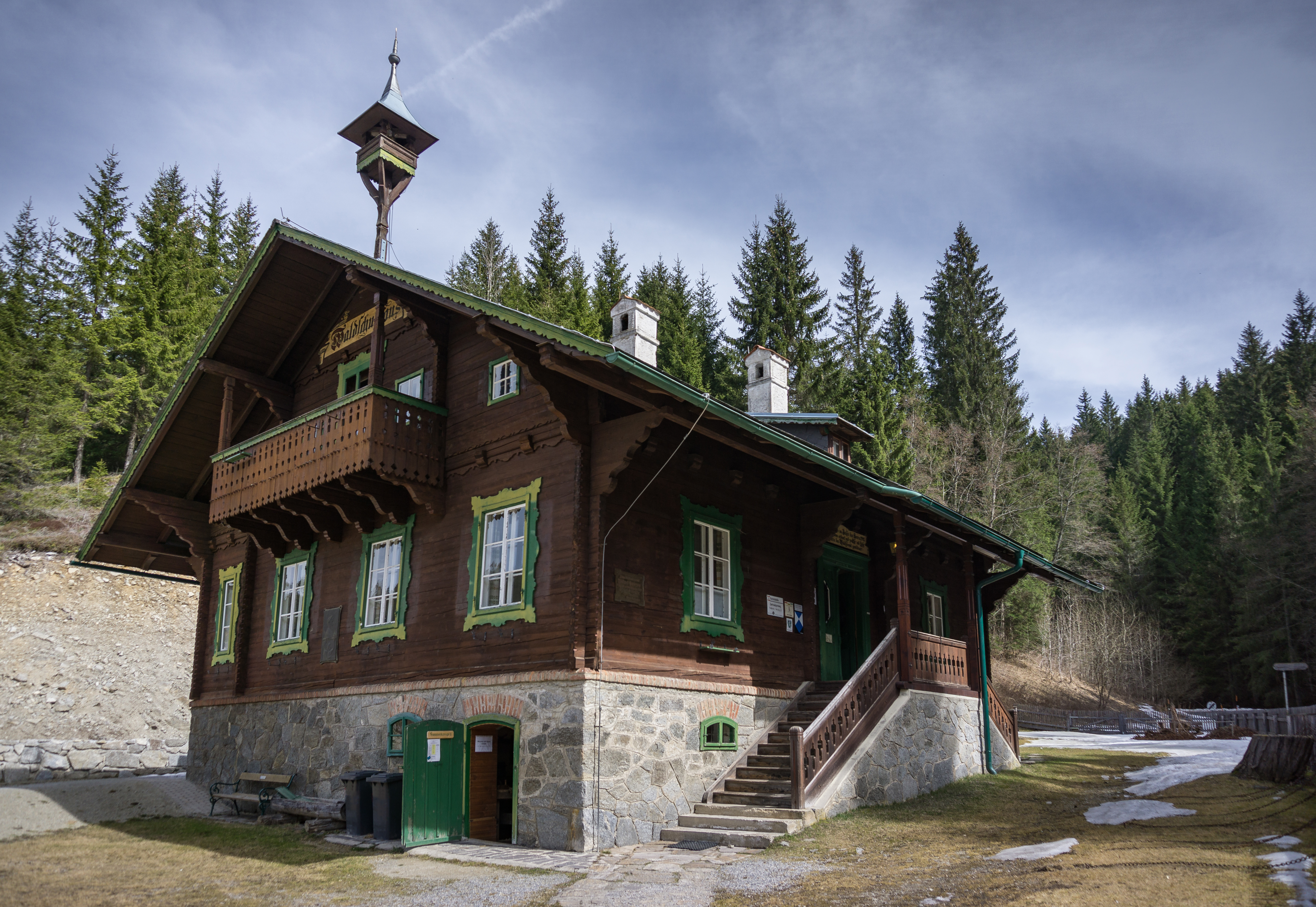 Roseggers Waldschule in Alpl/Krieglach